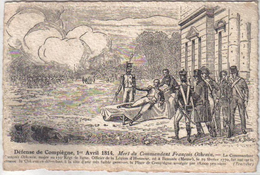 Défense de Compiègne, 1er Avril 1814. Mort du Commandant François Othenin. - Le Commandant François Othenin, marjor au 139e Régt. de ligne. Officier de la Légion d'Honneur, né à Beauzée (Meuse)n le 19 février 1770, fut tué sur la terrasse du Château en défendant, à la tête d'une très faible garnison, la Place de Compiègne, assiégée par 18.000 prussiens